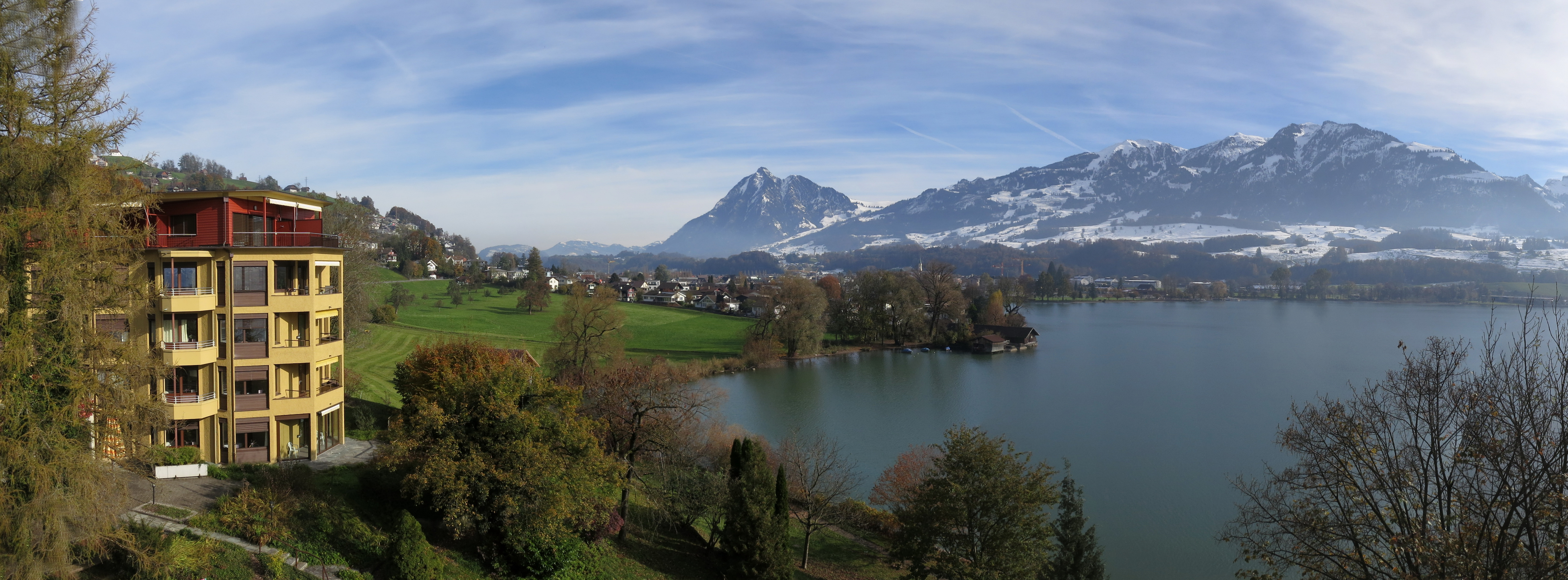 Das Hotel Kurhaus am Sarnersee liegt direkt am Sarnersee, mitten in der Obwaldner Bergwelt.